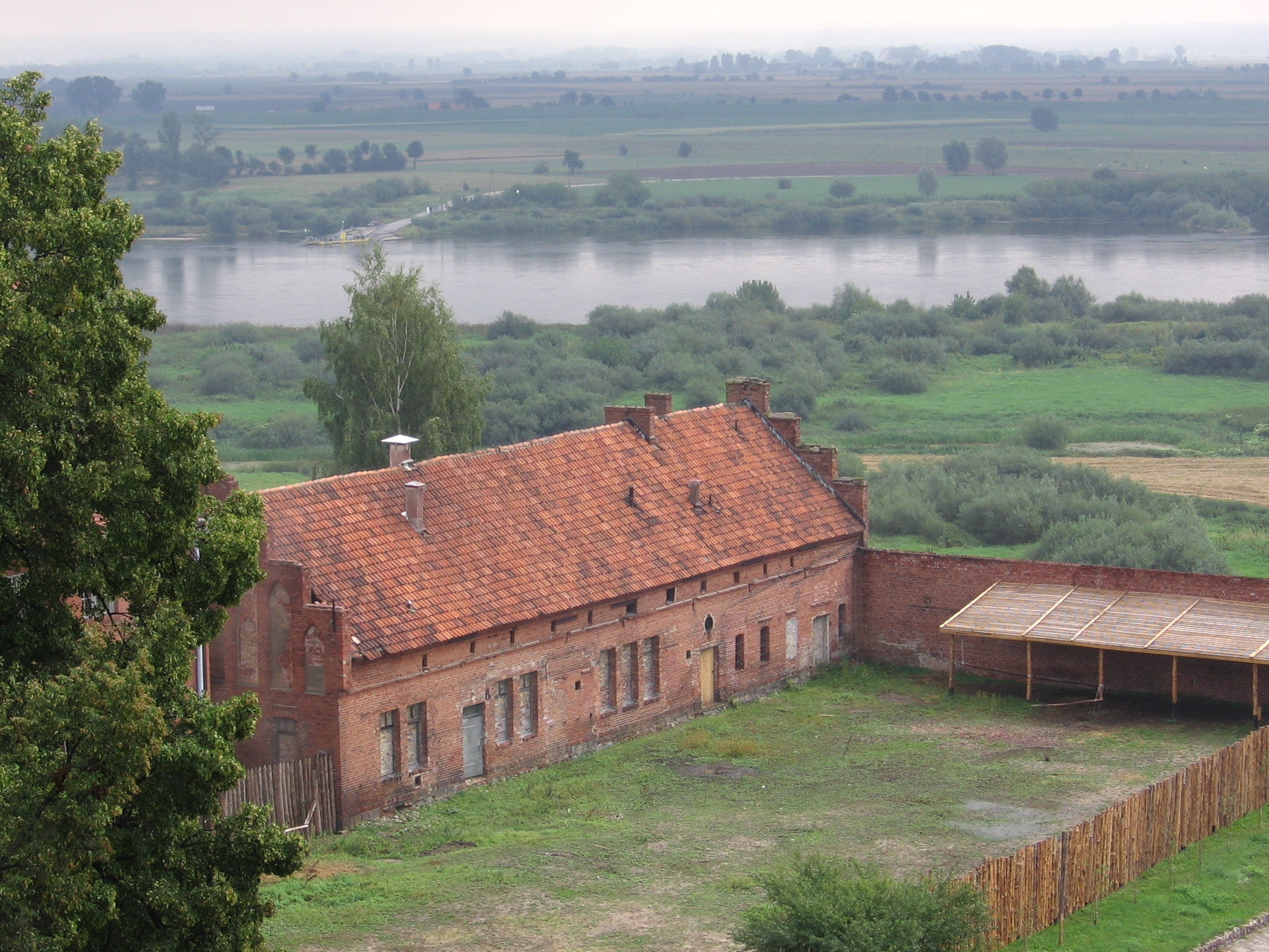 zespół zamkowy w Gniewie z obiektami: 1. zamek komturów gniewskich; 2. dom bramny; 3. budynek gospodarczy tzw. pałacyk Marysieńki; 4. pałacyk myśliwski; 5. mury obronne podzamcza; 6. mury dawnej fosy zamkowej; 7. studnia na dziedzińcu zamkowym wraz z działkami Gniew, Gniew